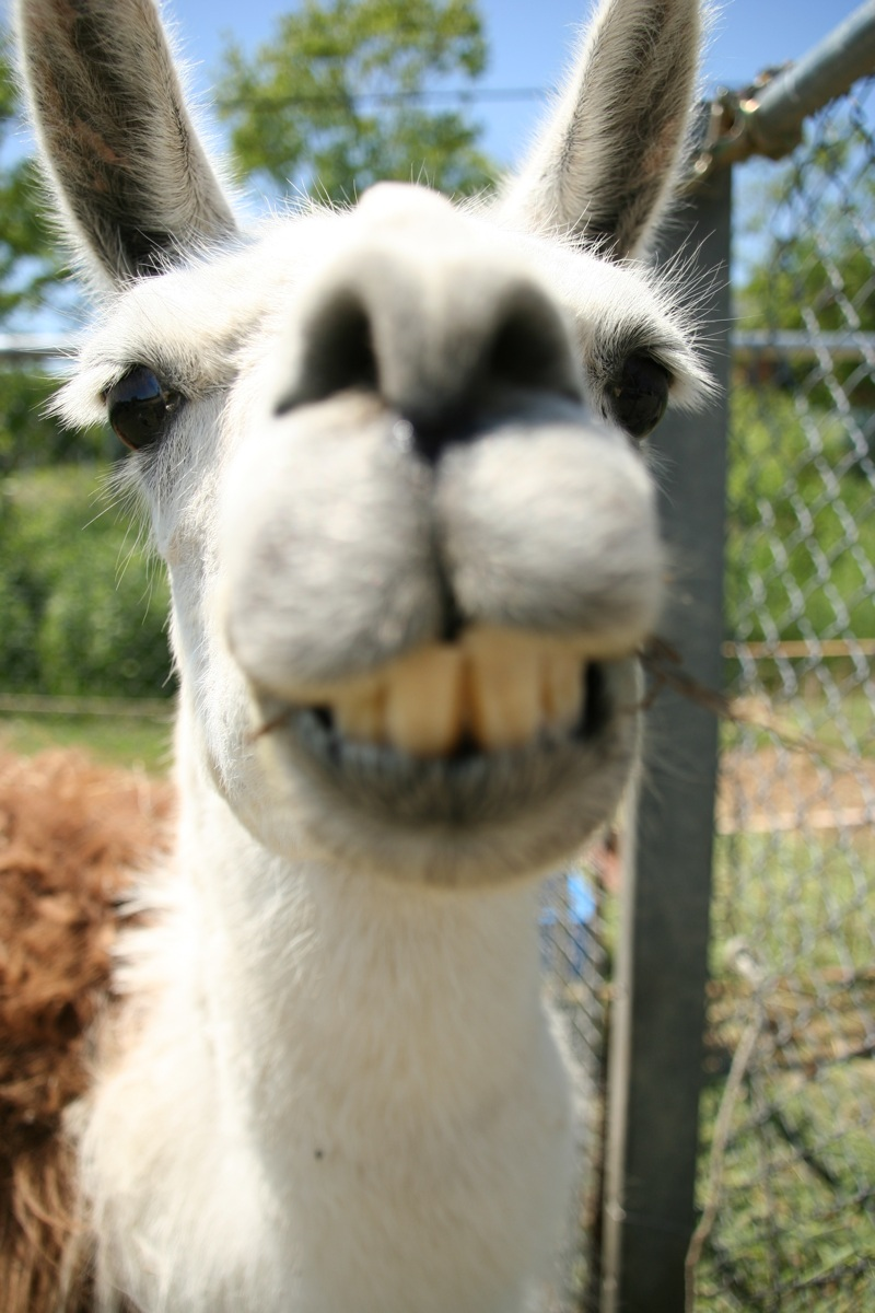 Funny face!!